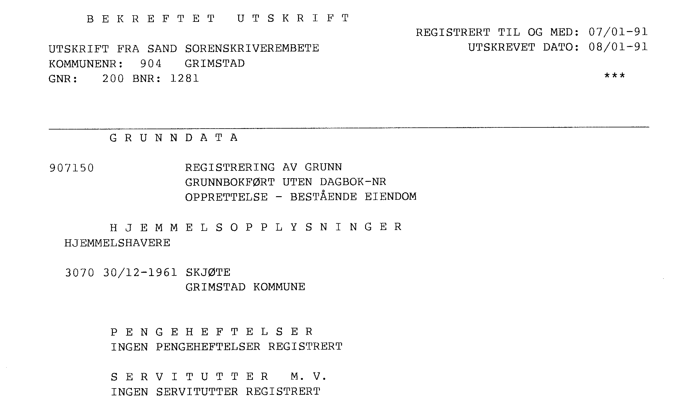 Grunnboksutskrift - Eksempel